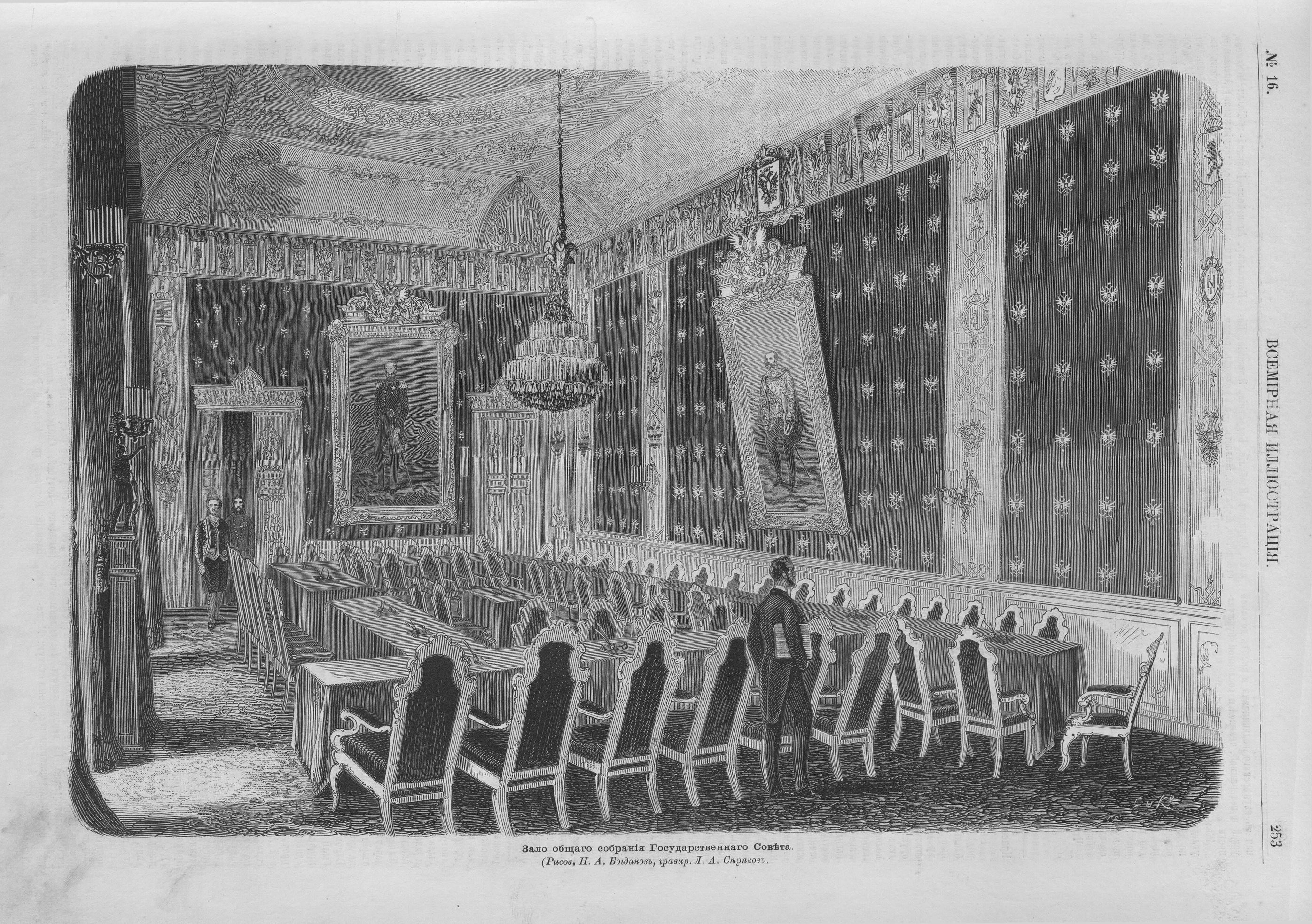 Зал общего собрания Государственного совета